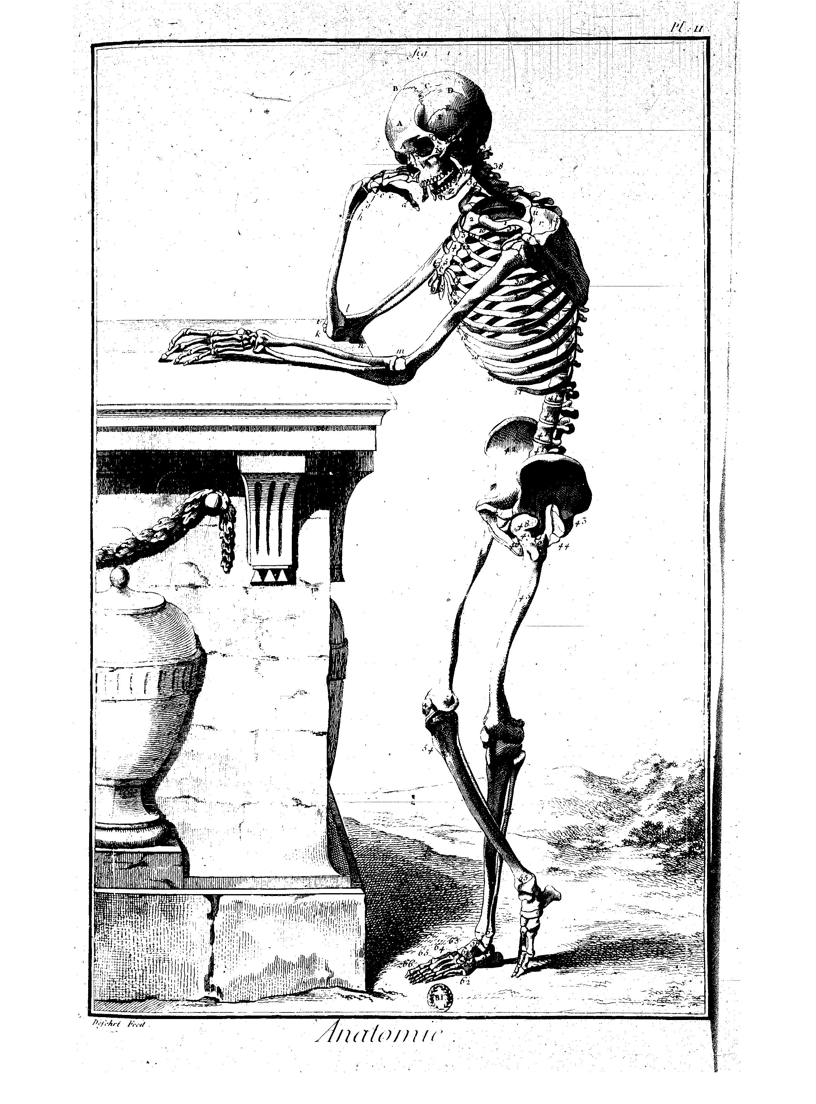 Planches de l'Encyclopédie de Diderot et d'Alembert, volume 1.